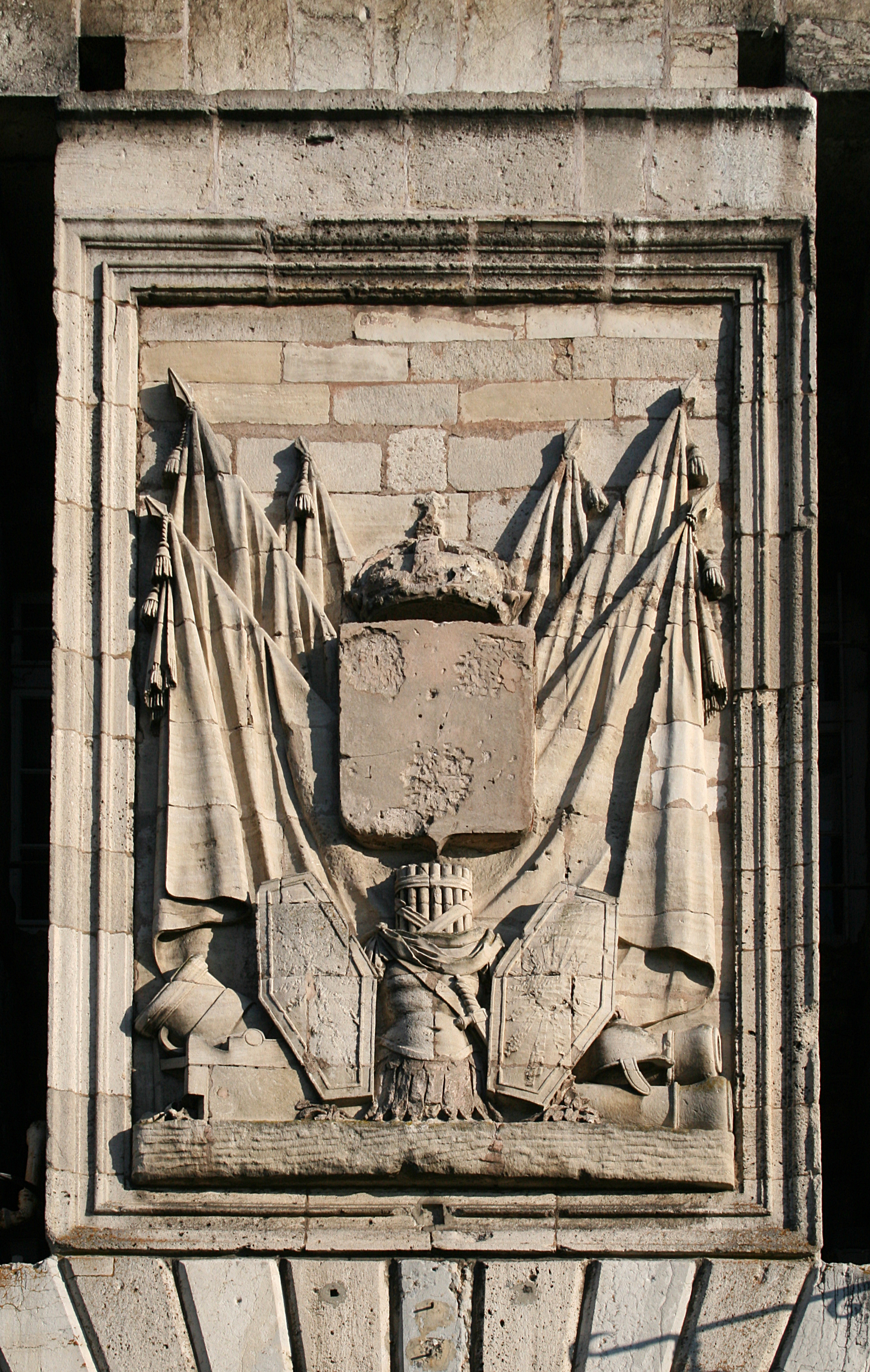 Besançon (Doubs (département) - France), bas-relief ornant la porte d’entrée de la Citadelle édifiée entre 1668 et 1683 par Sébastien Le Prestre de Vauban.